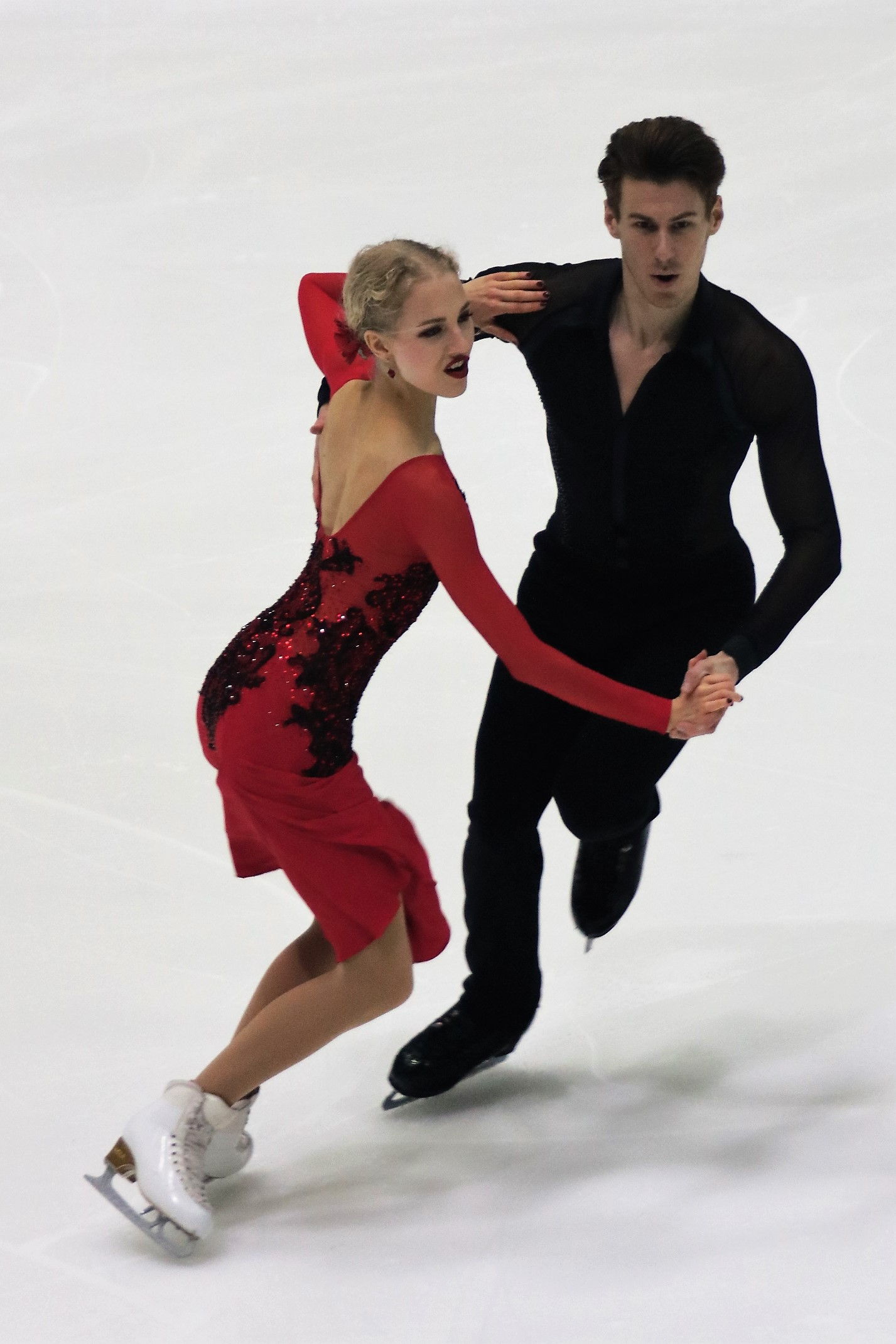 Юулия Турккила / Маттиас Верслуйс (Финляндия) на Гран-при Хельсинки 2018